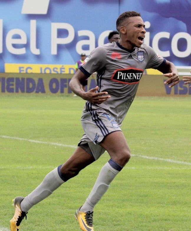 EMELEC GANA SU ESTRELLA NÚMERO 14